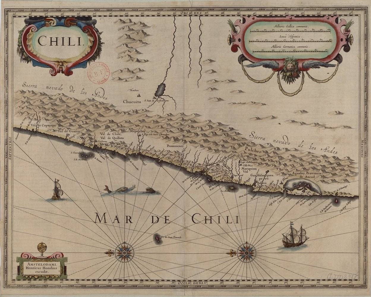 Chili